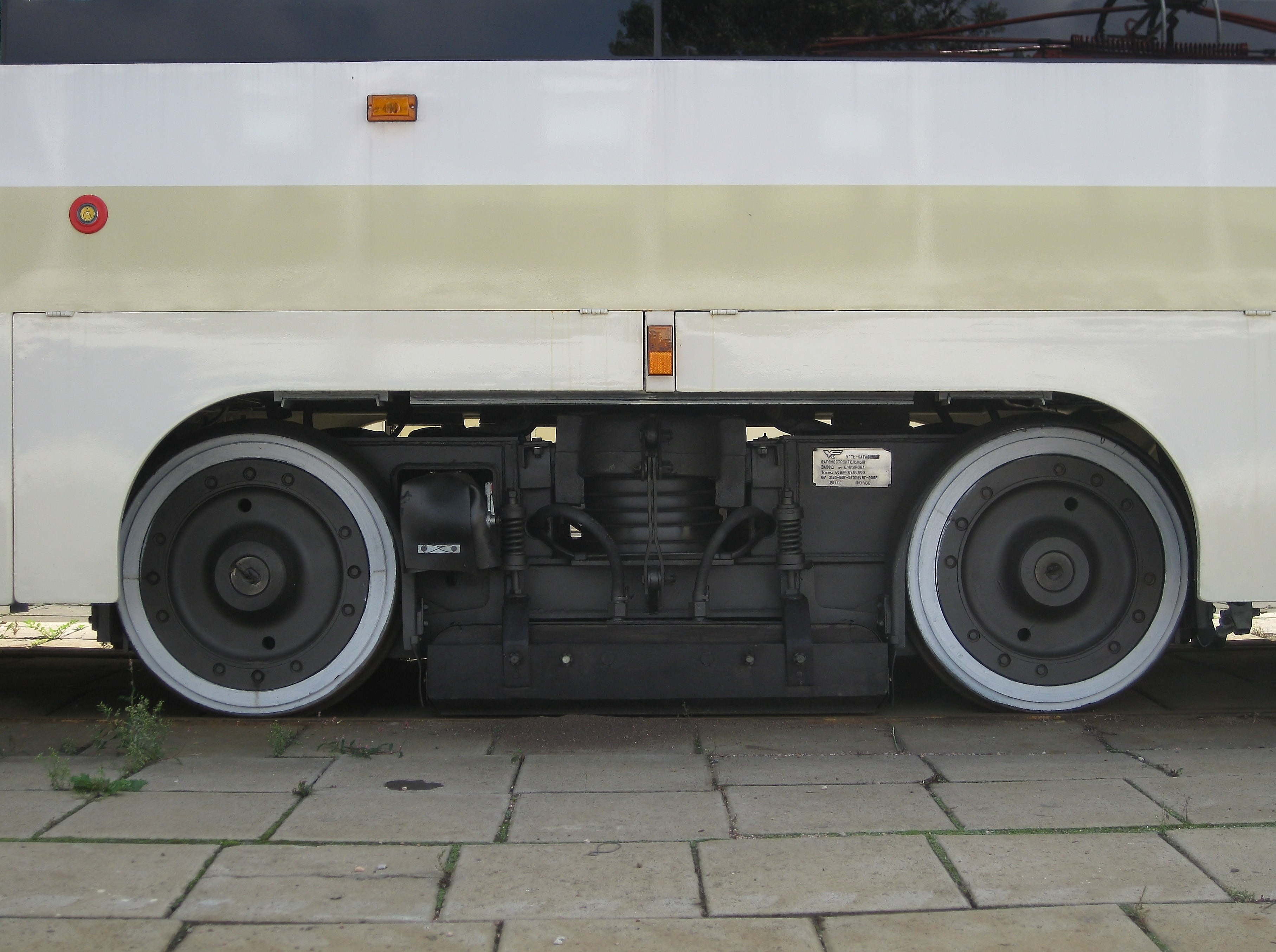 Тележка типа 608АМ для трамвайного вагона 71-619.